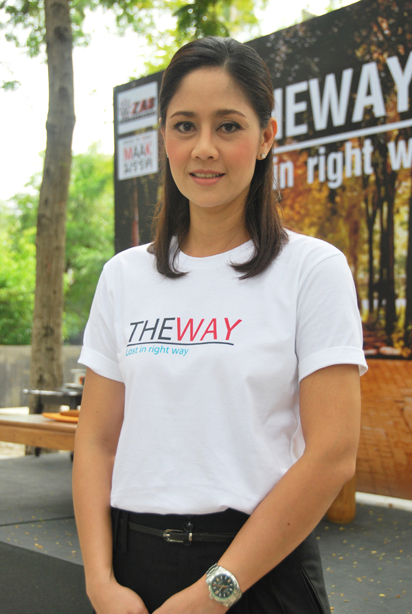 สินจัย เปล่งพานิช